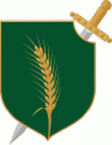 Simbolo dello ZBOR, "Movimento Nazionale Jugoslavo" attivo tra il 1935 e il 1945.